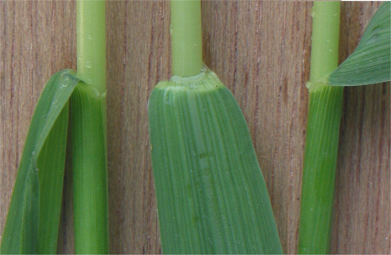 (Kweek) ligula Elytrigia repens